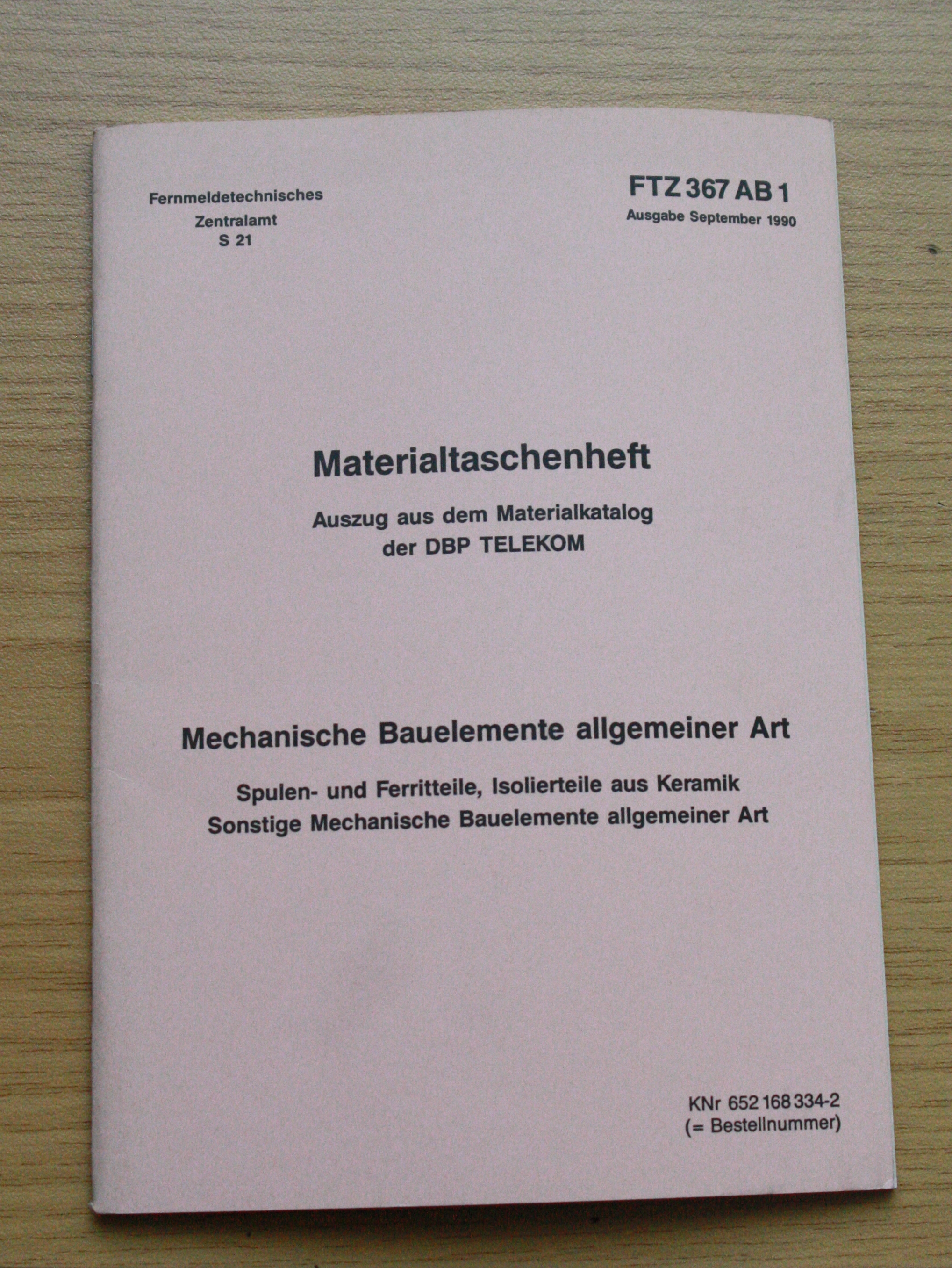 Kurzwellensendeanlage Wertachtal - Rückbau im April 2015, Materialtaschenheft der Telekom